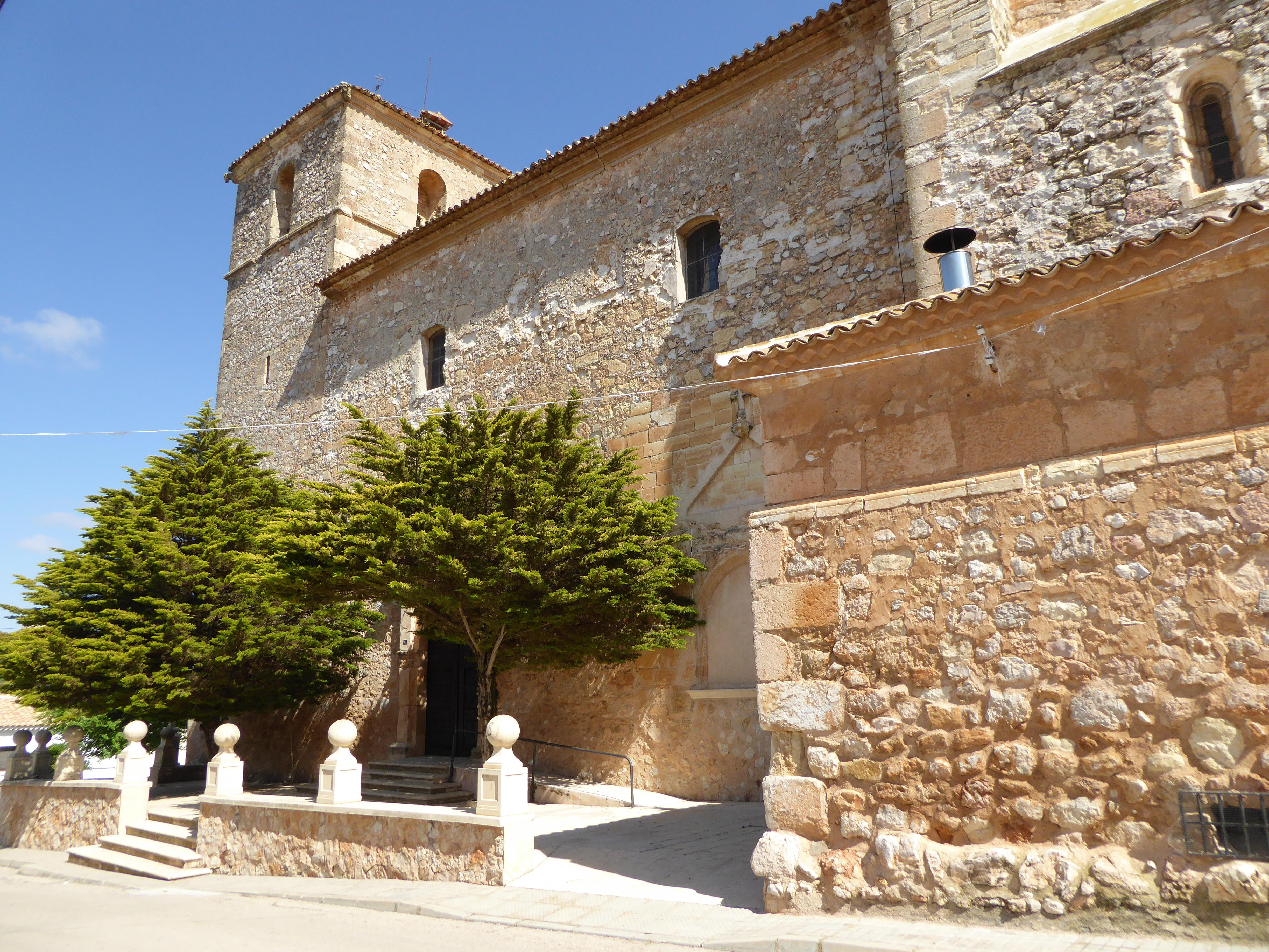 Los Hinojosos